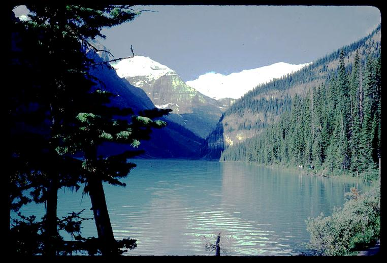 Lake Louise, Banff加拿大艾伯塔省班夫国家公园路易丝湖